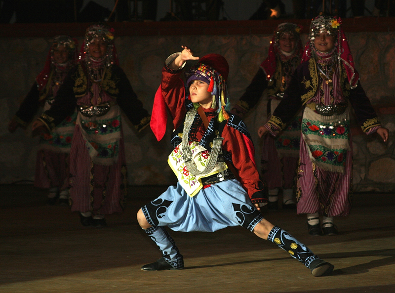 Zeybek oynayan çocuk